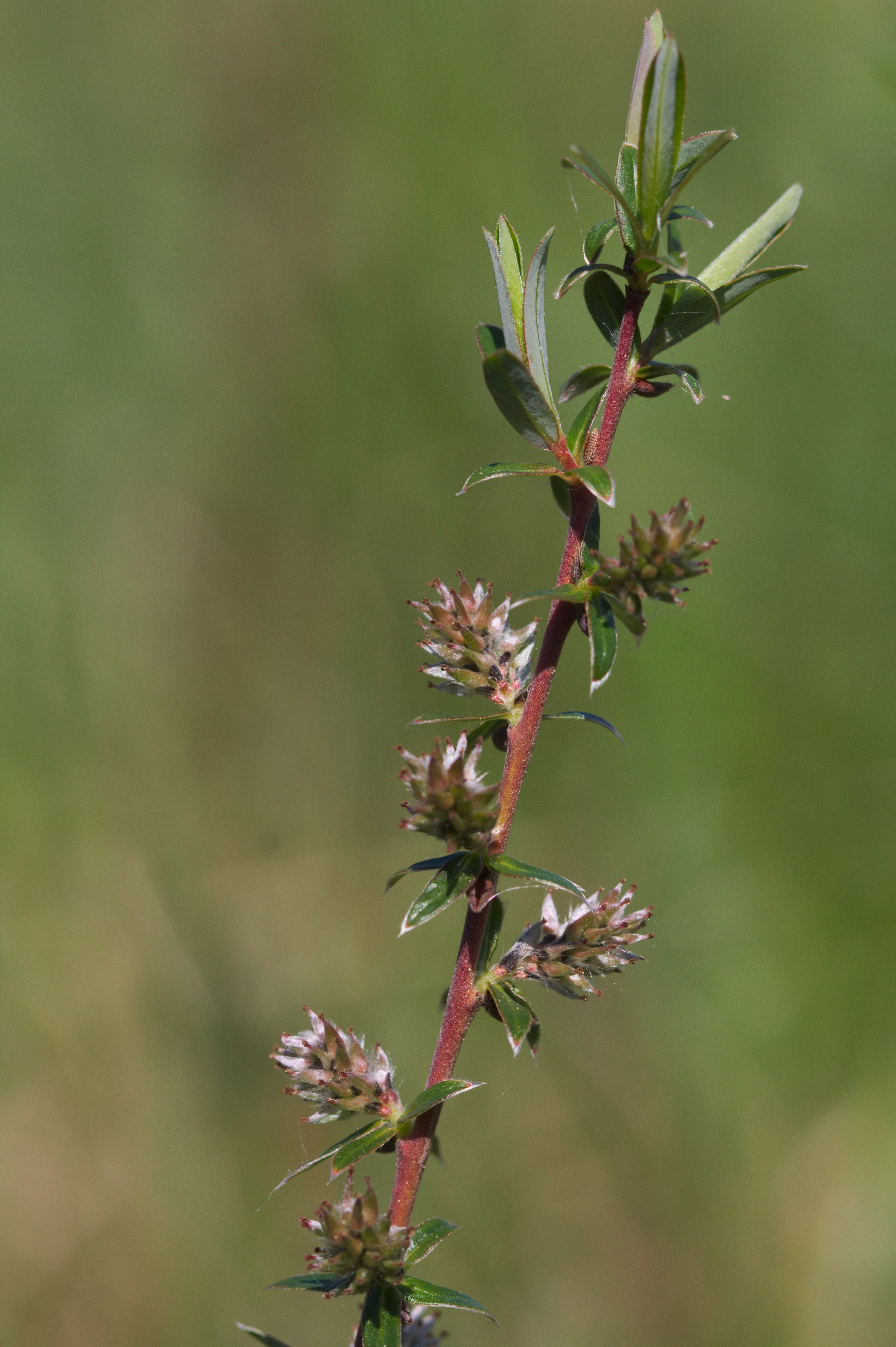 Brouskův mlýn - (národní přírodní rezervace) - Salix rosmarinifolia L., vrba rozmarýnolistá - status ohrožení v ČR: C3 (ohrožený)